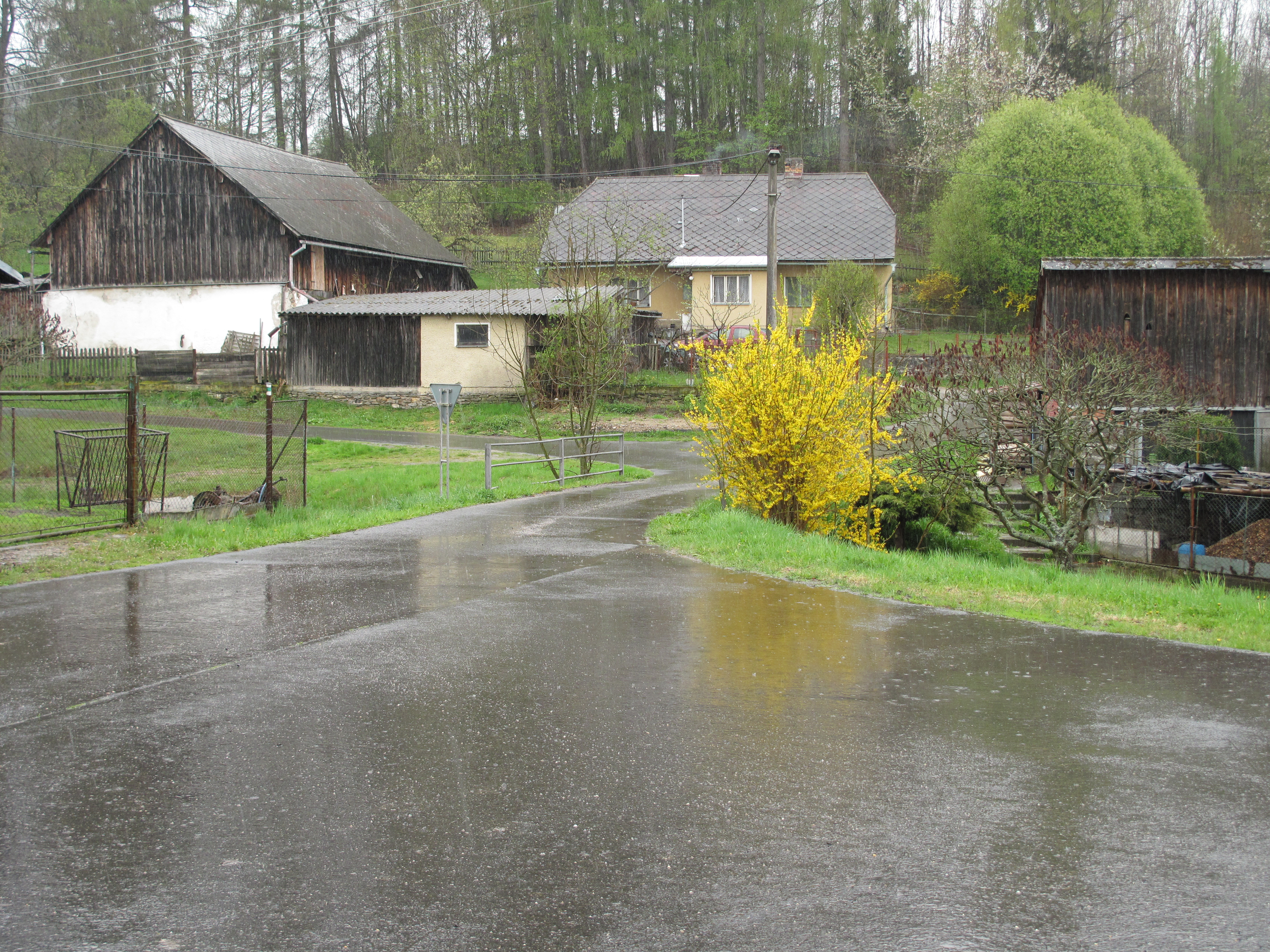 Brtí. Okres Klatovy, Česká republika.